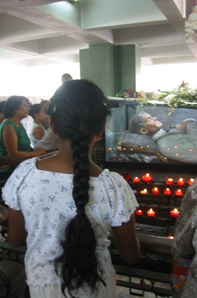 Tombeau du Père Jacques-Désiré Laval, à Maurice. Photographie personnelle de Benoît Smerecki - Elle peut être utilisée librement.